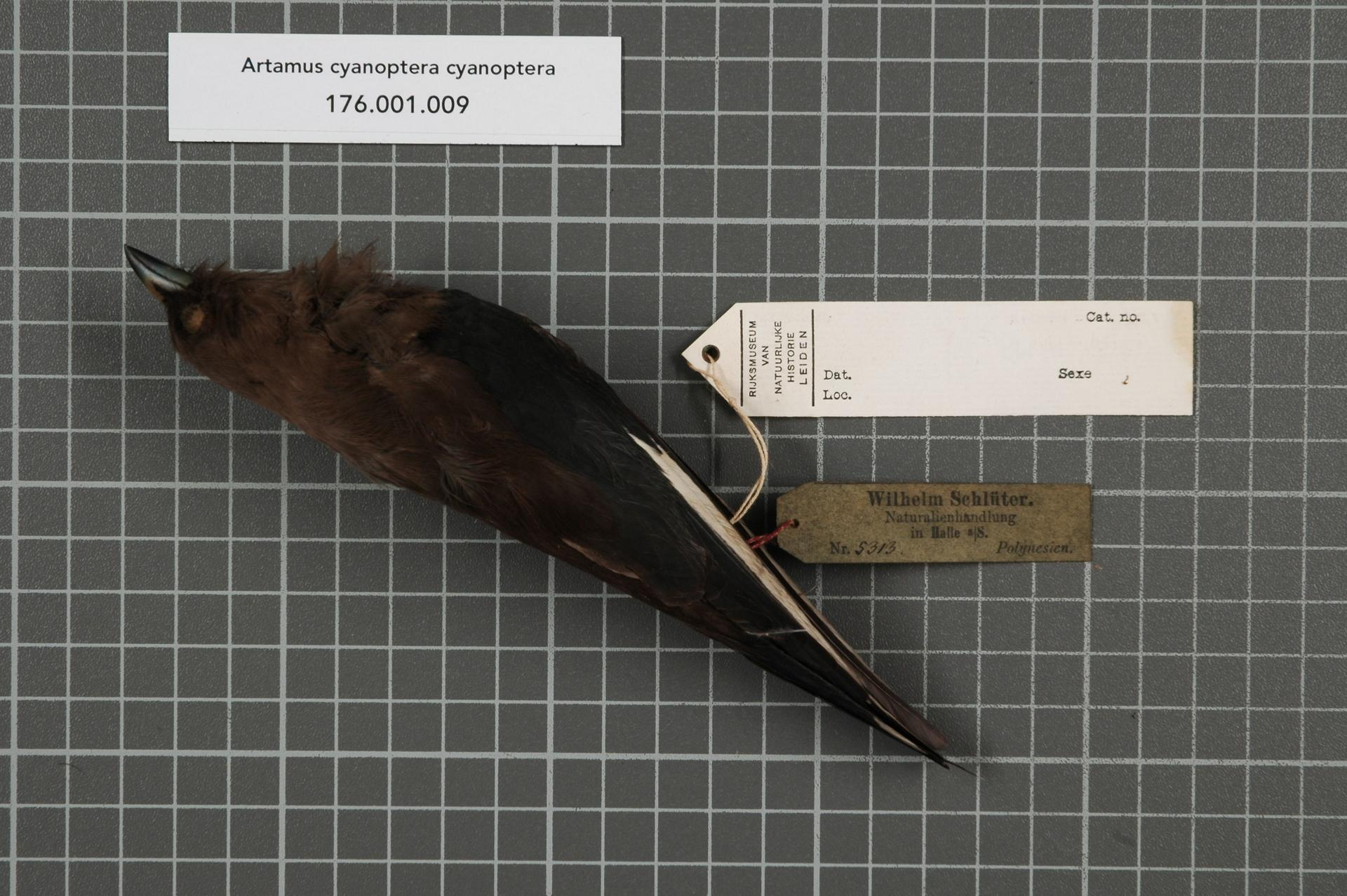 Artamus cyanoptera cyanoptera (Latham, 1801)